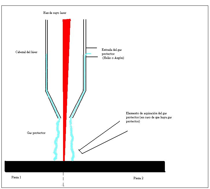 Dibujo de una soldadura por rayo laser